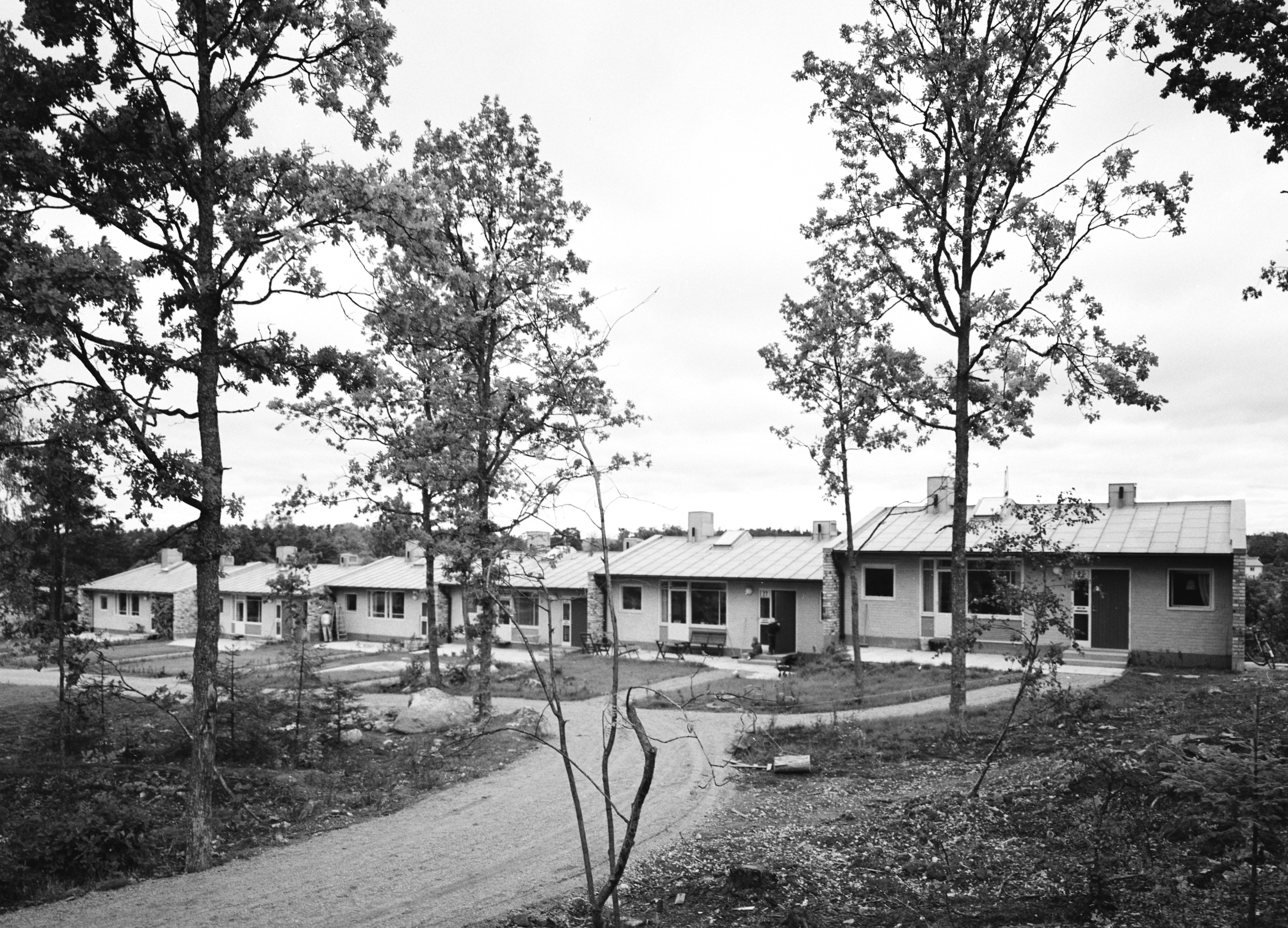 Atlantisområdet, Vällingbyhöjden